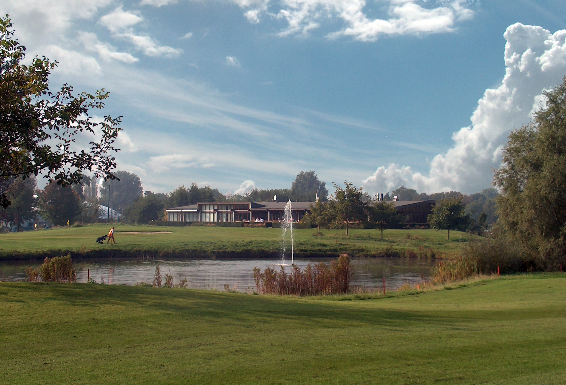 Leeuwenbergh golfbaan met nieuw clubhuis, 2008